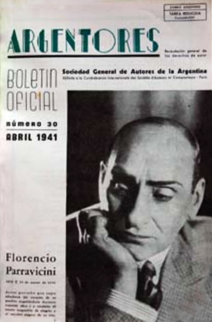 Revista Argentores 1941. Órgano oficial de Argentores. En la tapa Florencio Parravicini.